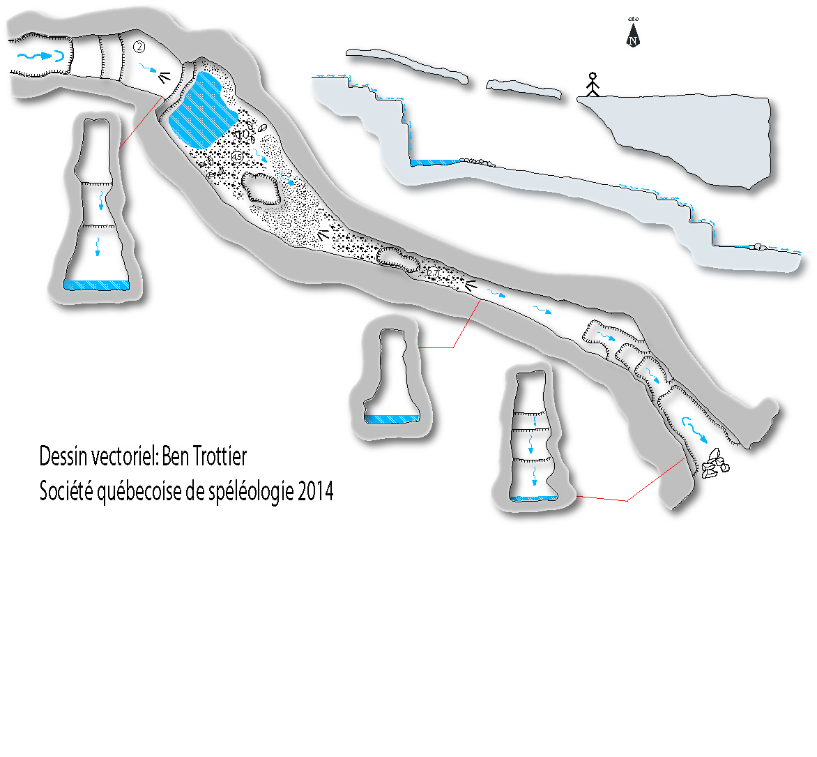 Format jpg a partir d'un dessin vectoriel de la topographie de la Grotte aux Cascatelles de Ben Trottier 2014